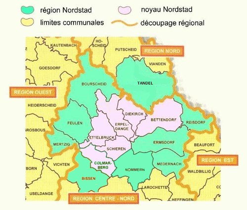 Die Karte zeigt die Nordstad, sowie ihre 6 Kerngemeinden.